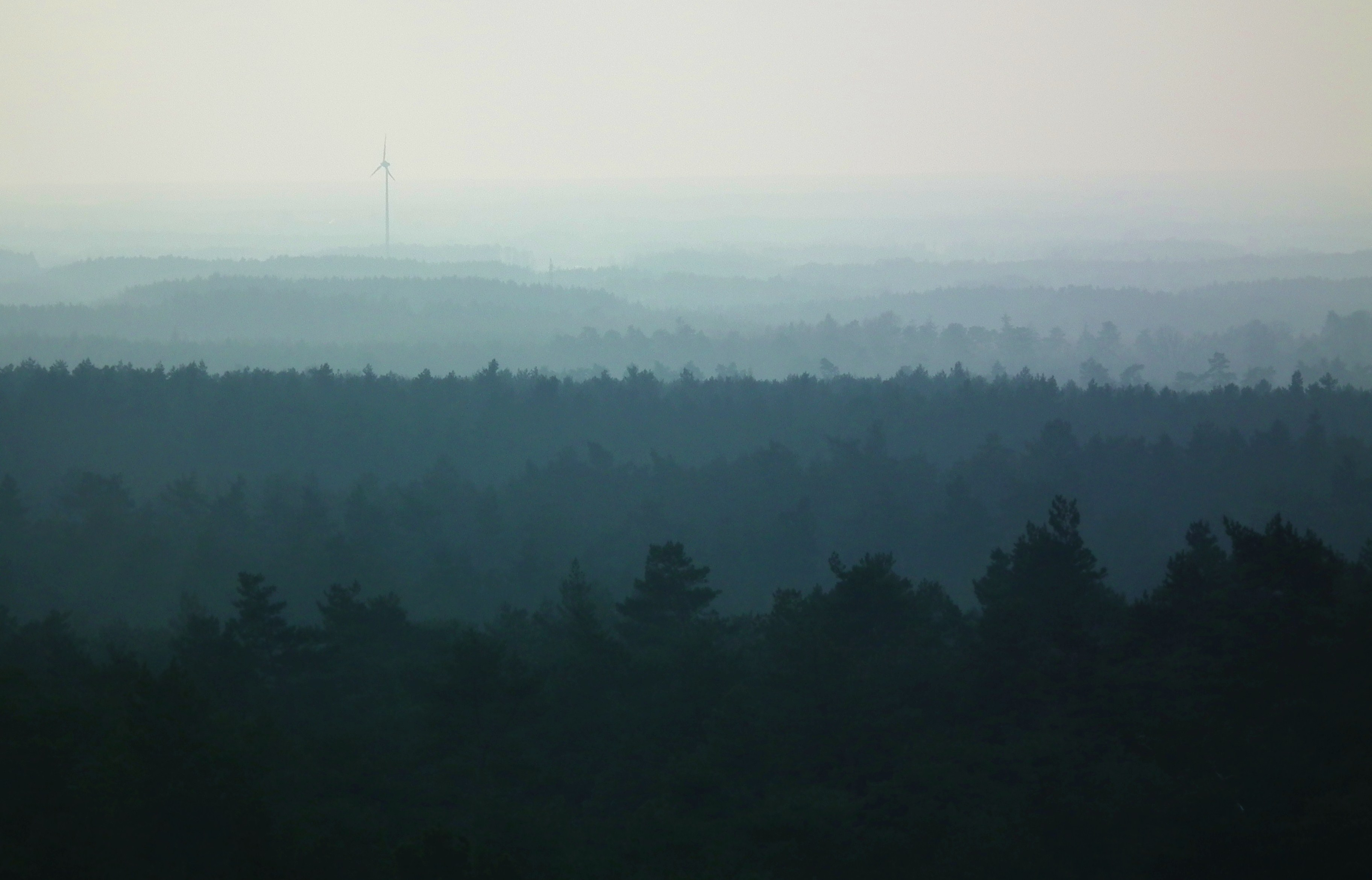 Rezerwat Złota Góra pod Koninem.